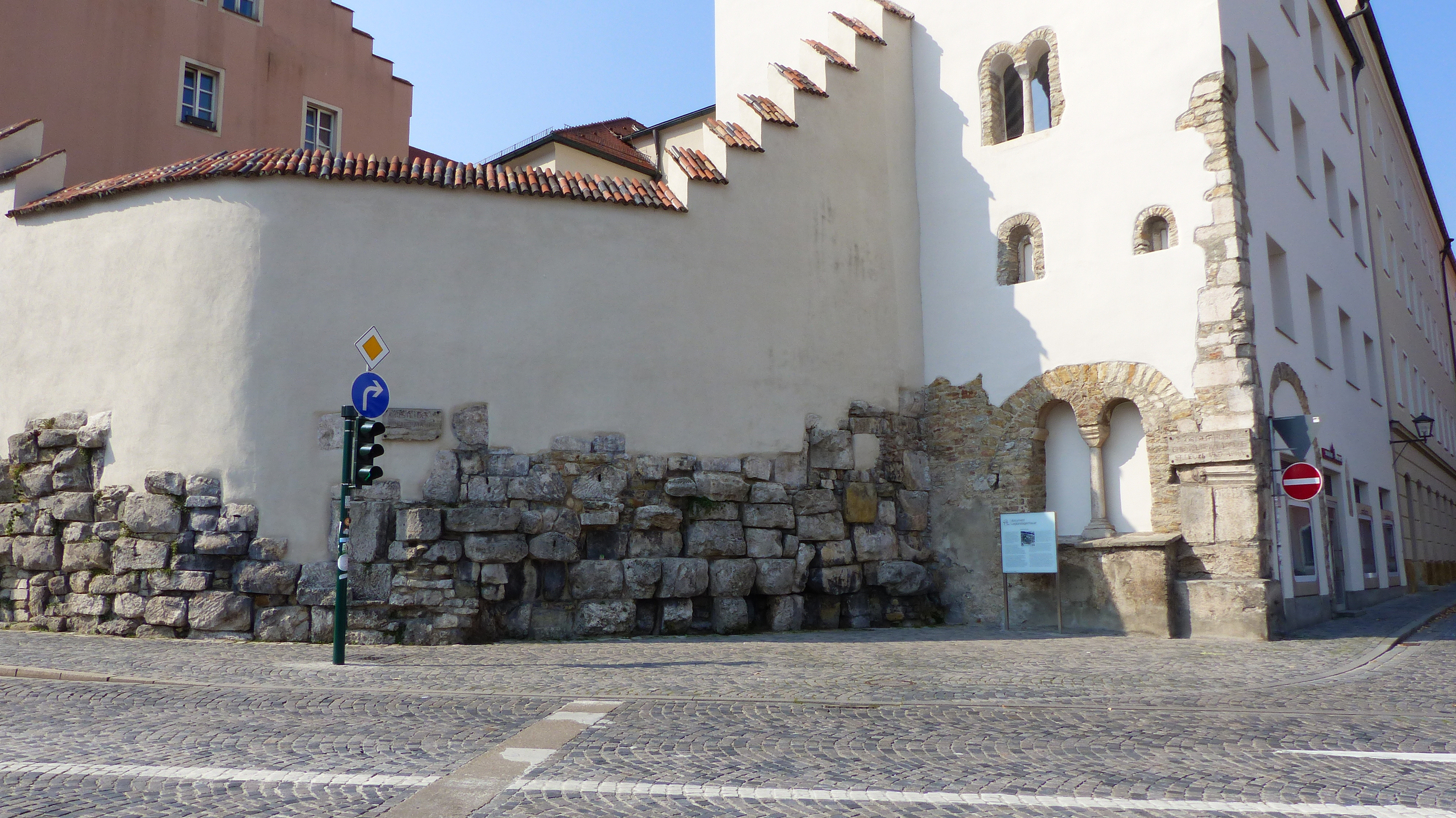 Castra Regina in Regensburg, Reste der Befestigungsmauer des römischen Legionslagers, Adolph-Kolping-Straße, Östliche Seite bzw. nordöstliche EckeThis is a photograph of an architectural monument.